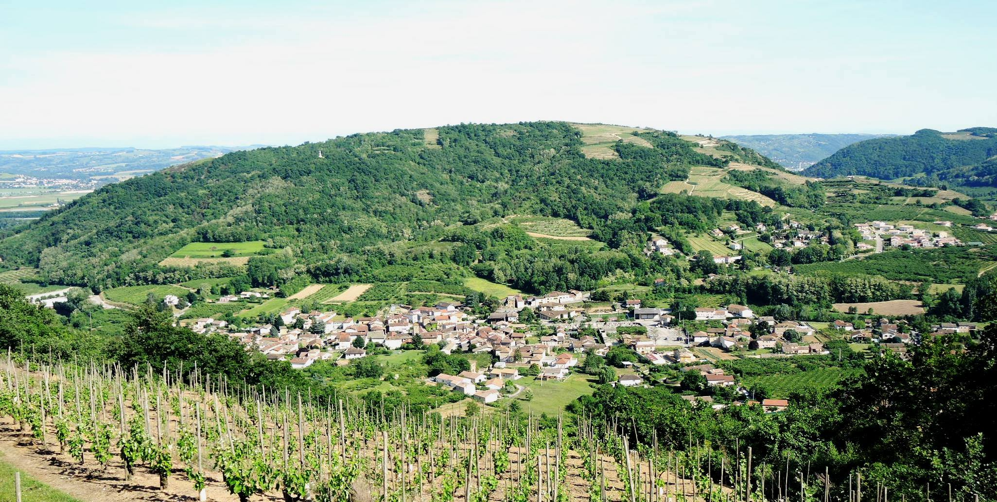 Saint-Désirat détail